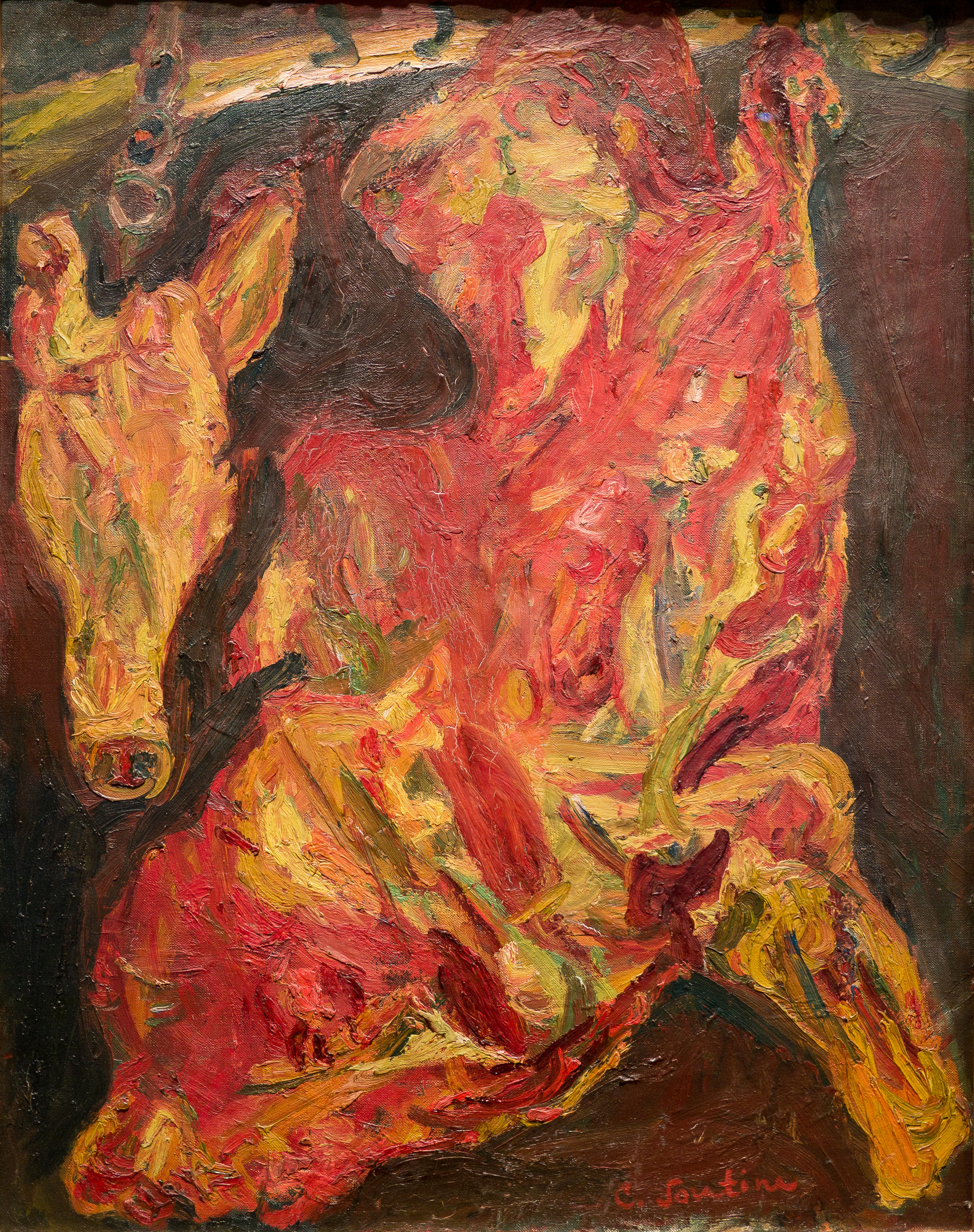 Chaïm Soutine (1893 - 1943), "Bœuf et tête de veau", huile sur toile, vers 1923, Coll. Jean Walter et Paul Guillaume, Musée de l'Orangerie, Paris